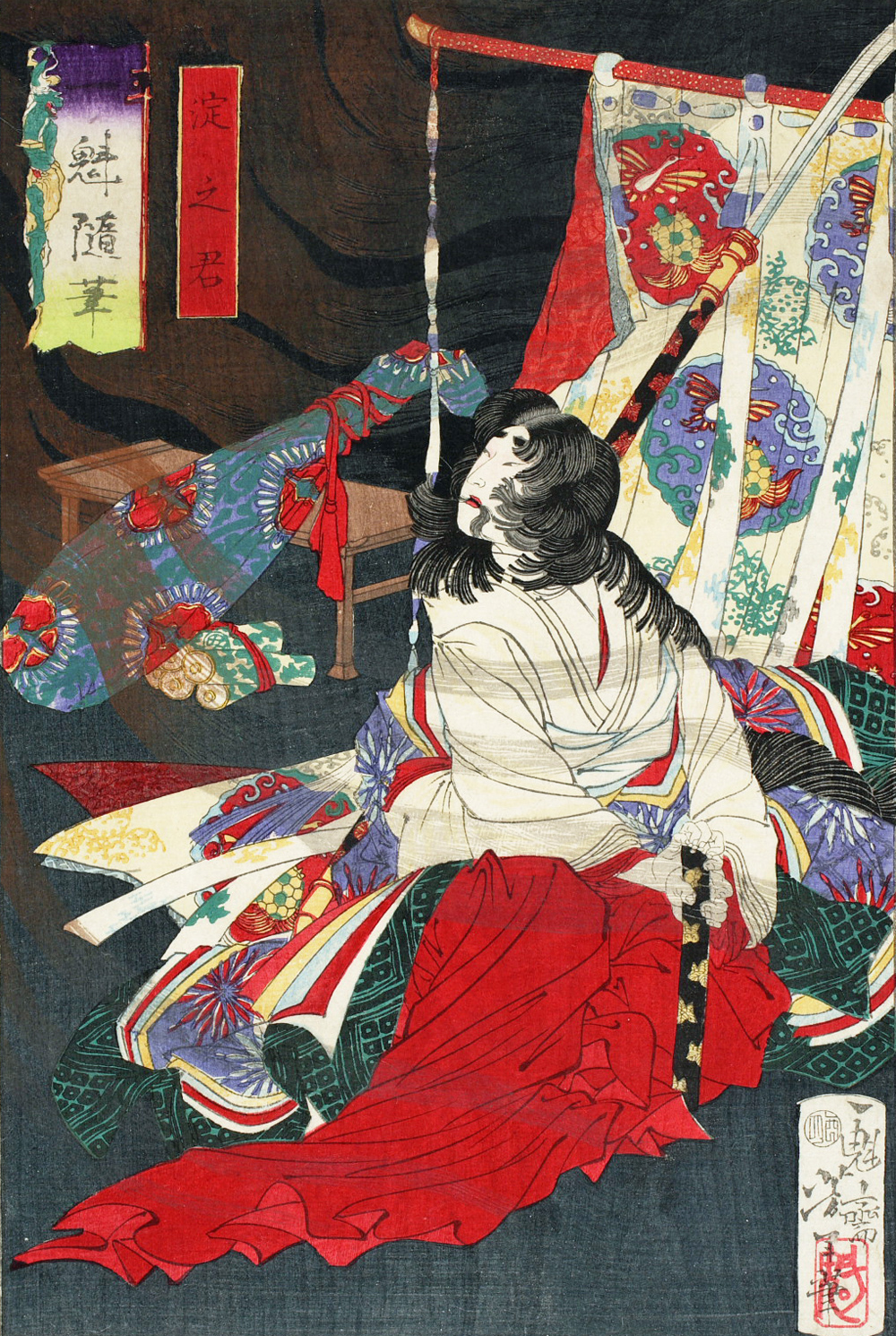 「一魁随筆：淀之君」